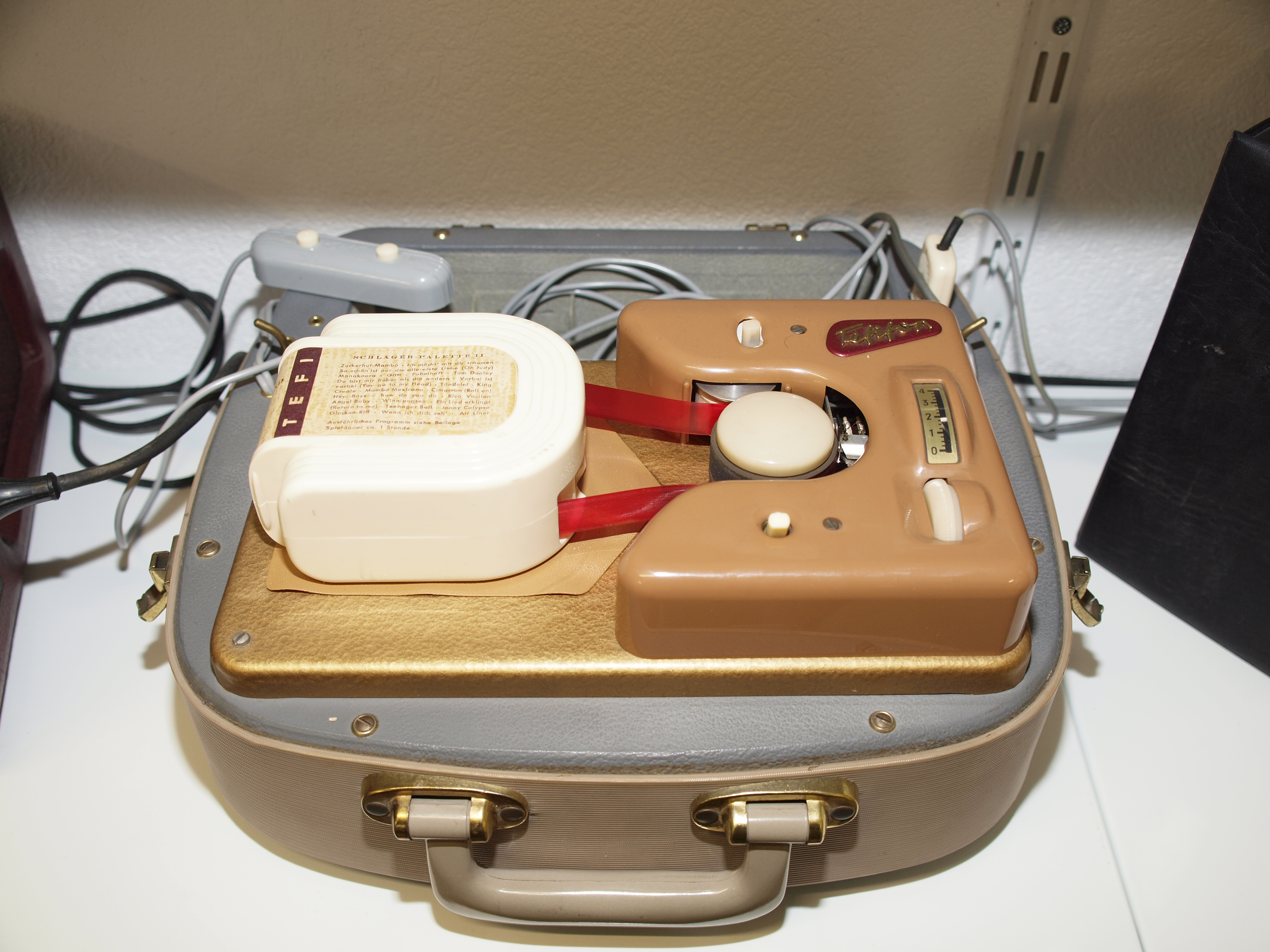 Ein Tefifon im Koffer. Ausgestellt im Museum Enter in soloturn.